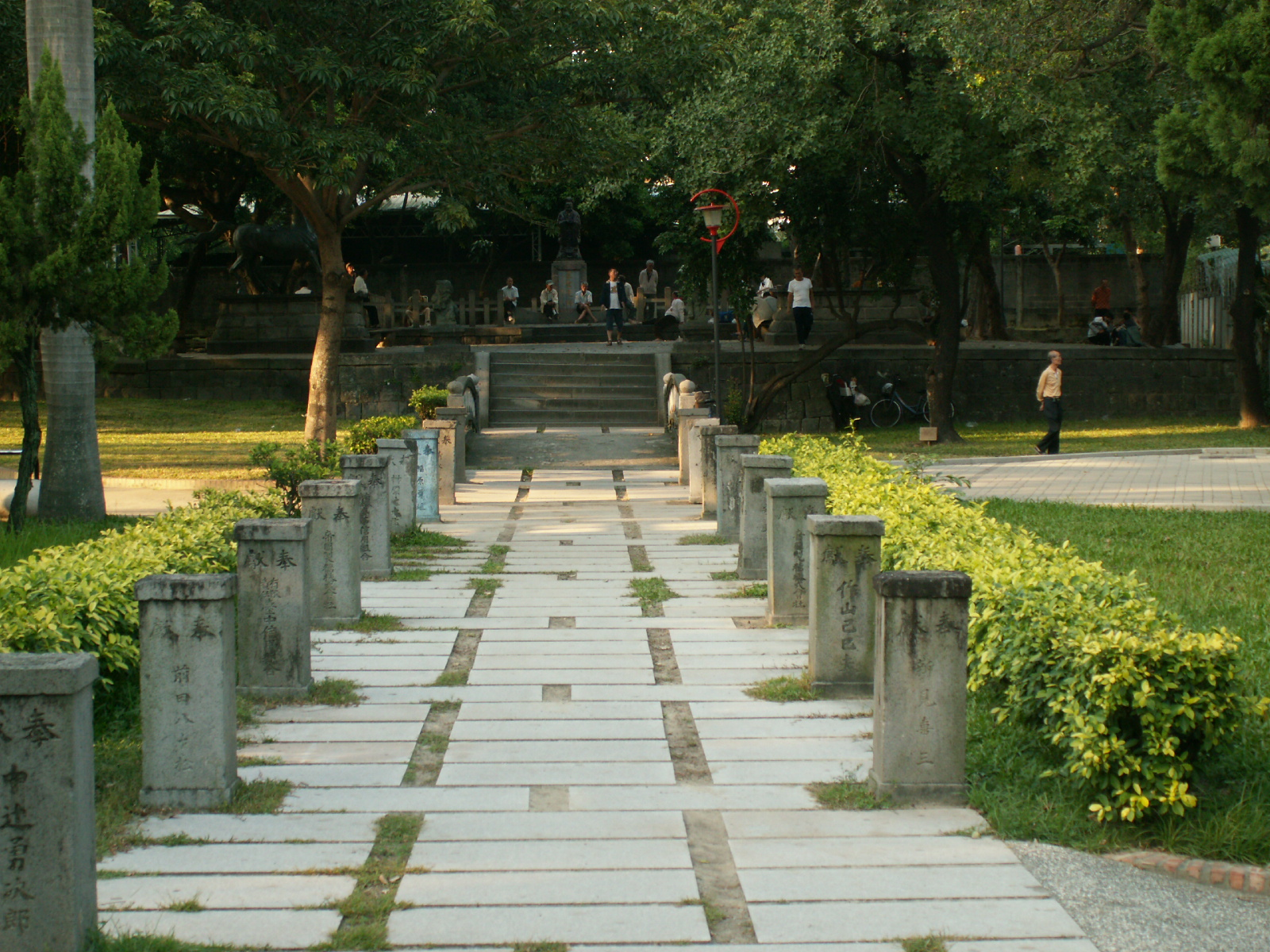 台中神社跡。